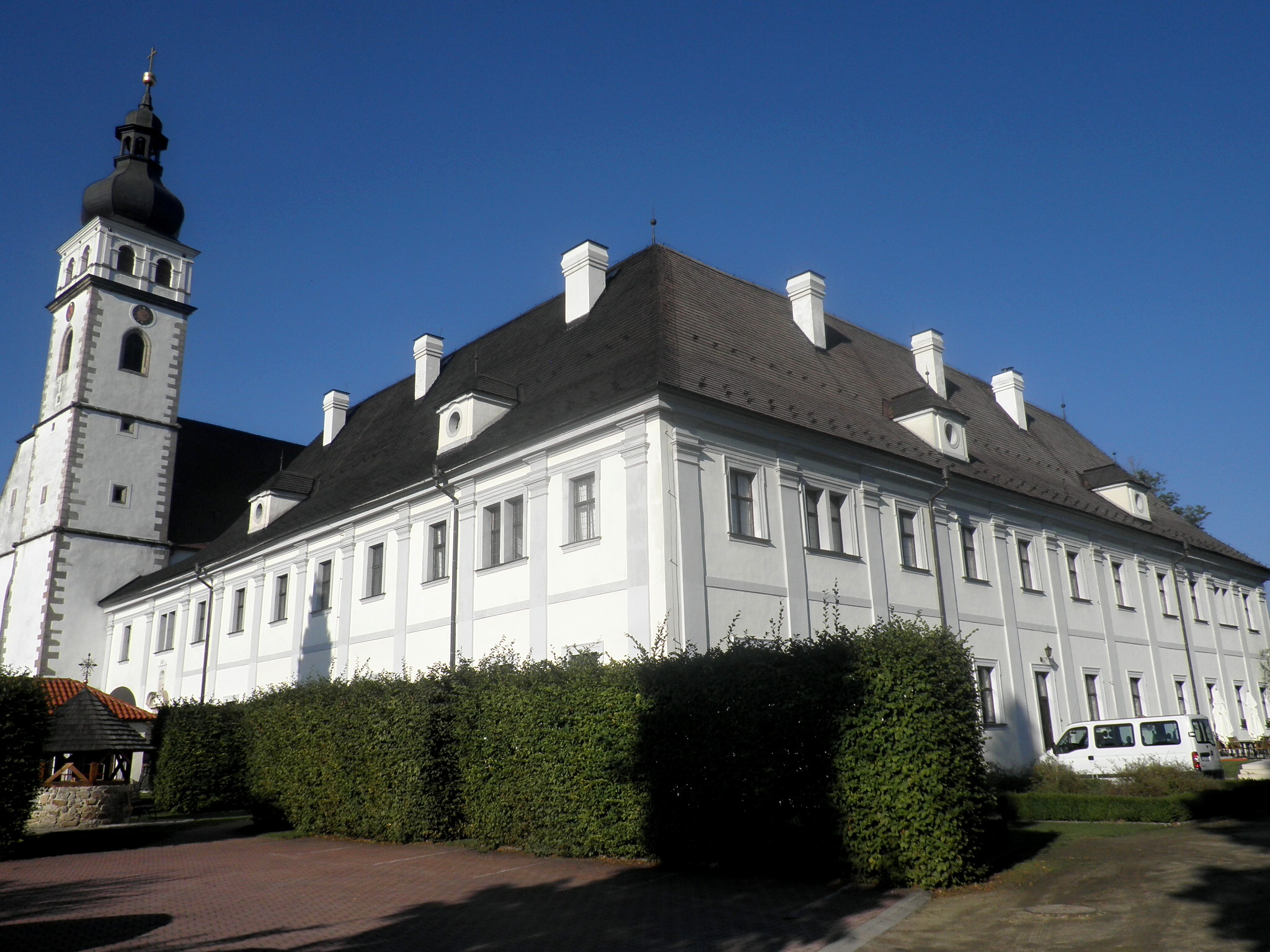 Klášter servitů (Nové Hrady), Husova 2, Nové Hrady